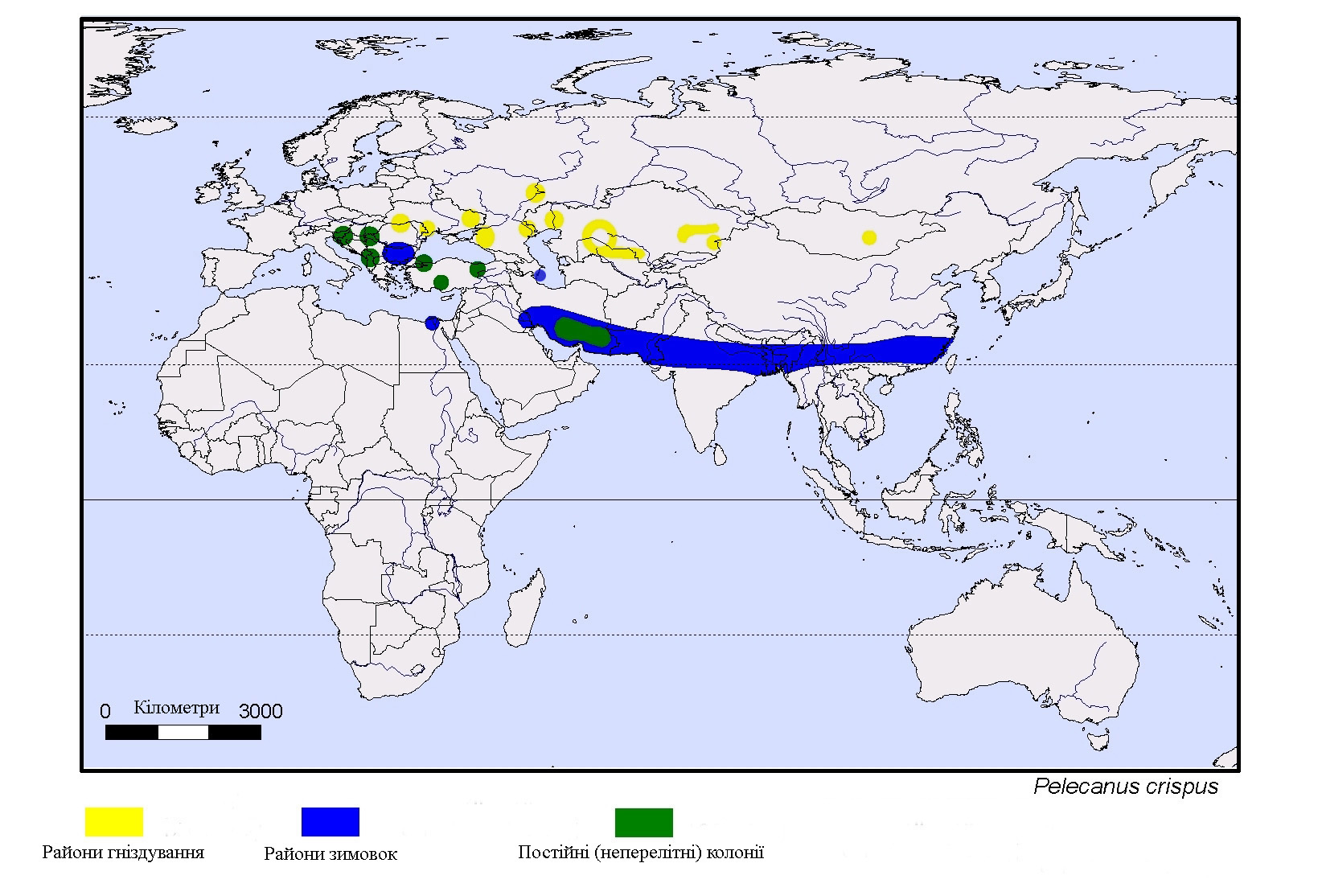 Розповсюдження кучерявого пелікана (pelecanus crispus)